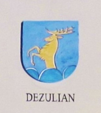 Cognomi storici dei Vicini che discendono dalle famiglie della Regola che abitavano a Predazzo e riguardano 19 cognomi: Boninsegna, Bonora, Bosin, Brigadoi, Defrancesco, Degaudenz, Dellagiacoma, Dellantonio, Dellasega, Demartin, Dezulian, Felicetti, Gabrielli, Giacomelli, Guadagnini, Morandini, Nicolao, Piazzi e Zanna.